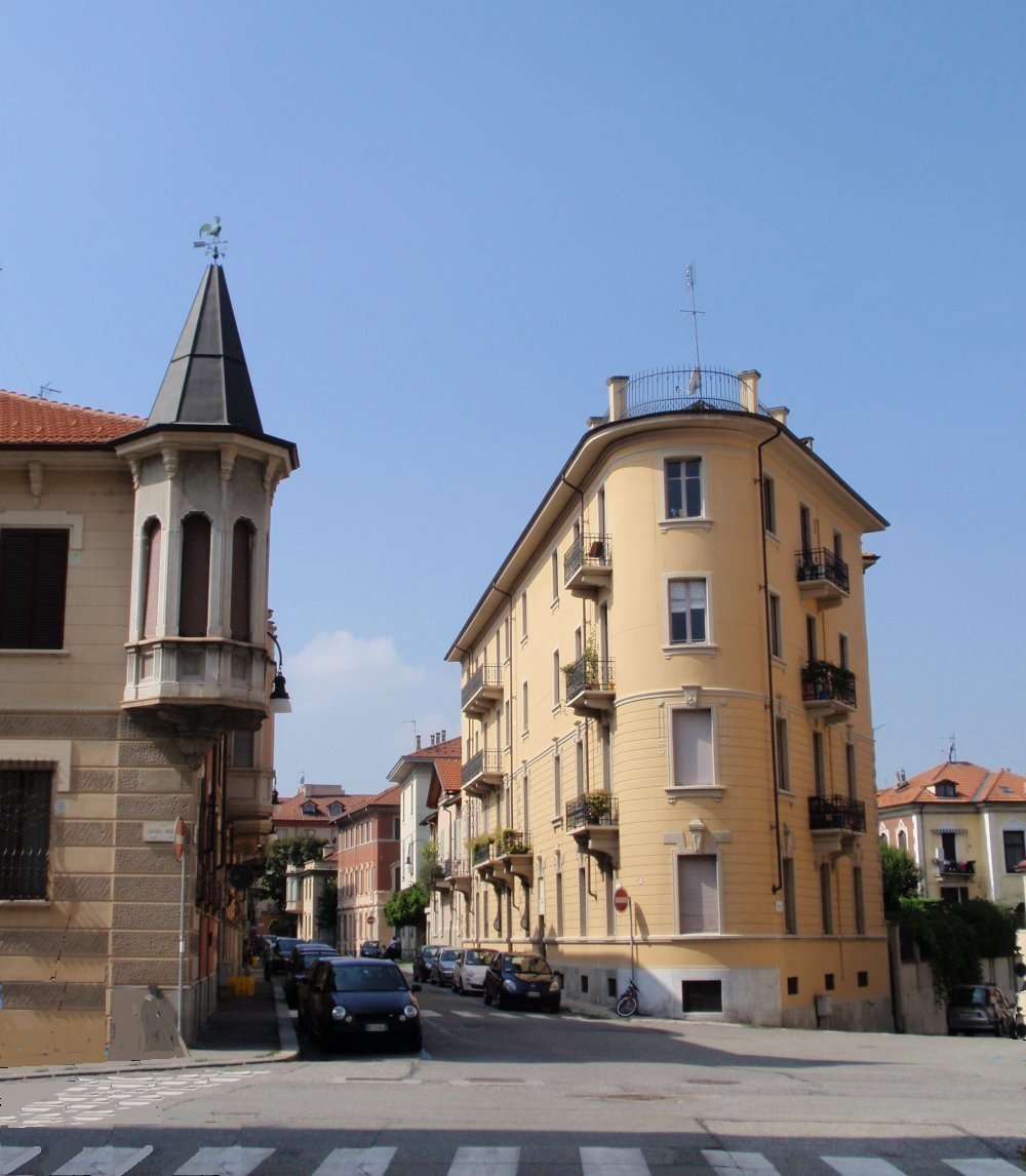 Scorcio del quartiere. Incrocio delle vie Ornato e Martiri della libertà. Borgo Po Torino Italia